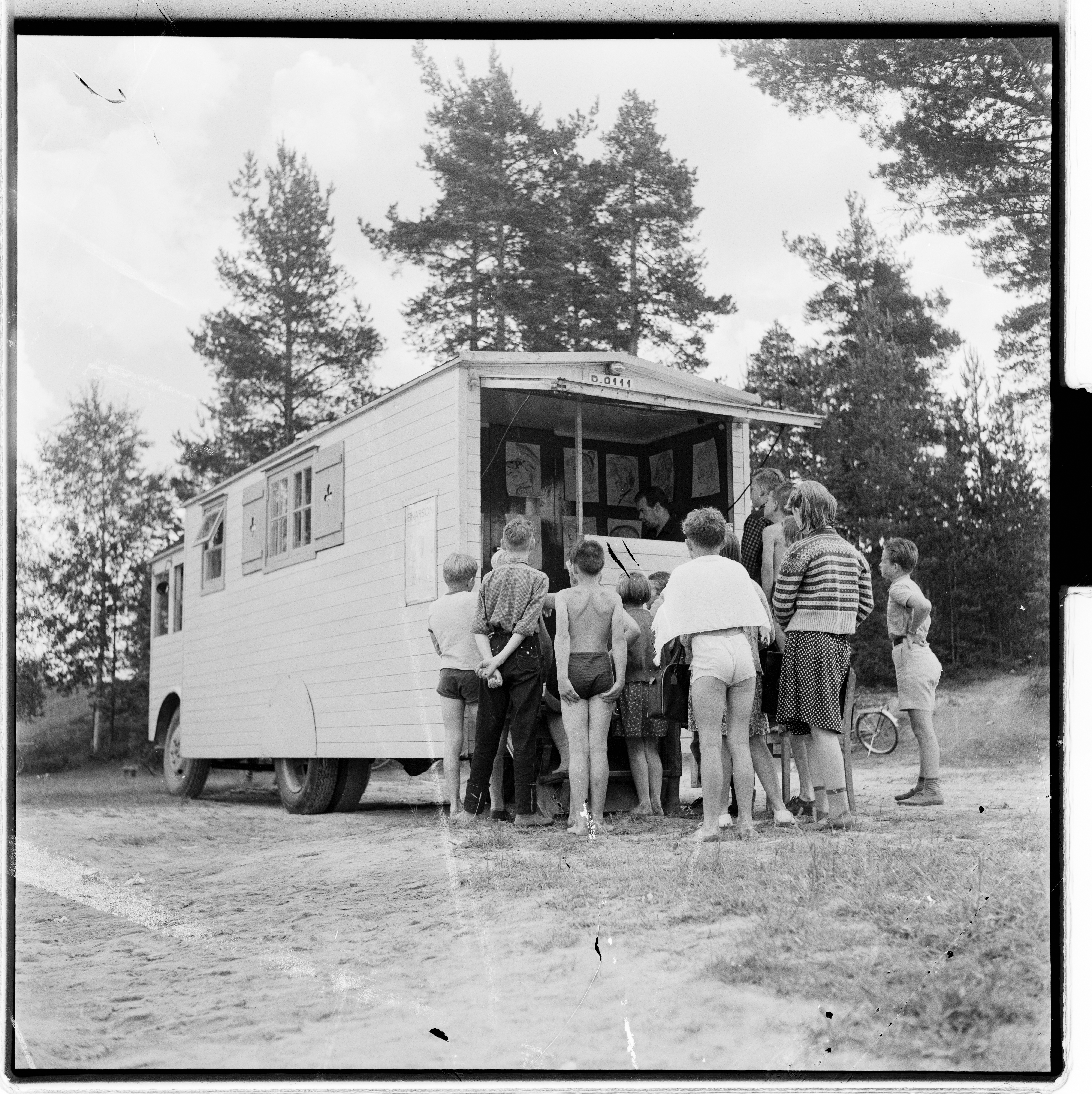 Bildet er hentet fra Arkivverket. Kunstneren og karikaturtegneren Odd Einarson fotografert i sitt rullende atelier, bilen Ruslebo Arkivinstitusjon : Riksarkivet Arkivnavn : Billedbladet NÅ Sted : Norge, Ukjent, Ukjent, Emneord: Kunstnere, Karikaturtegnere, Barn Avbildet: Einarson, Odd